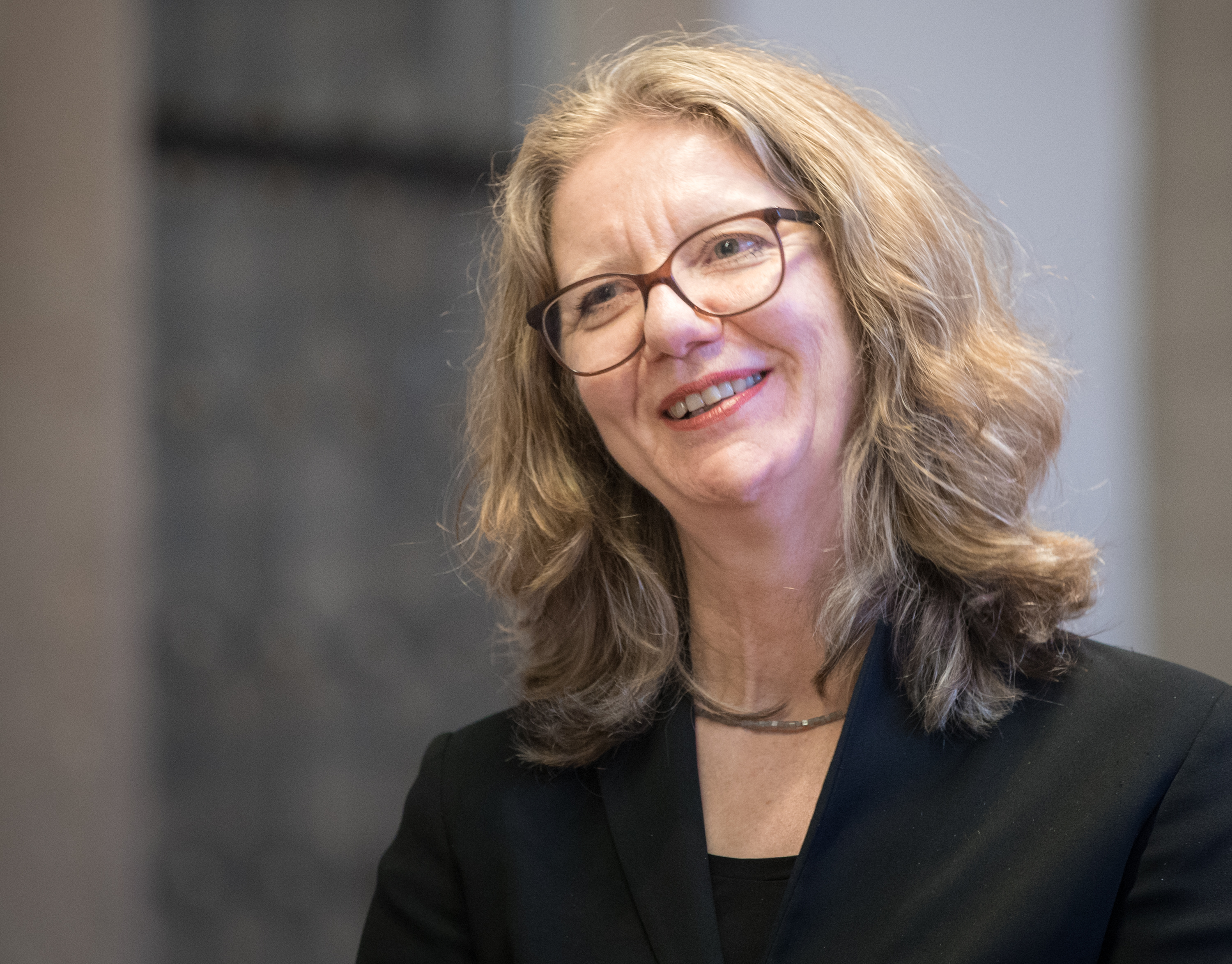 Veranstaltung anlässlich des Eintrages ins Goldene Buch der Stadt Köln – zwei verdiente Architekten und eine Architektin. Hier: Dörte Gatermann